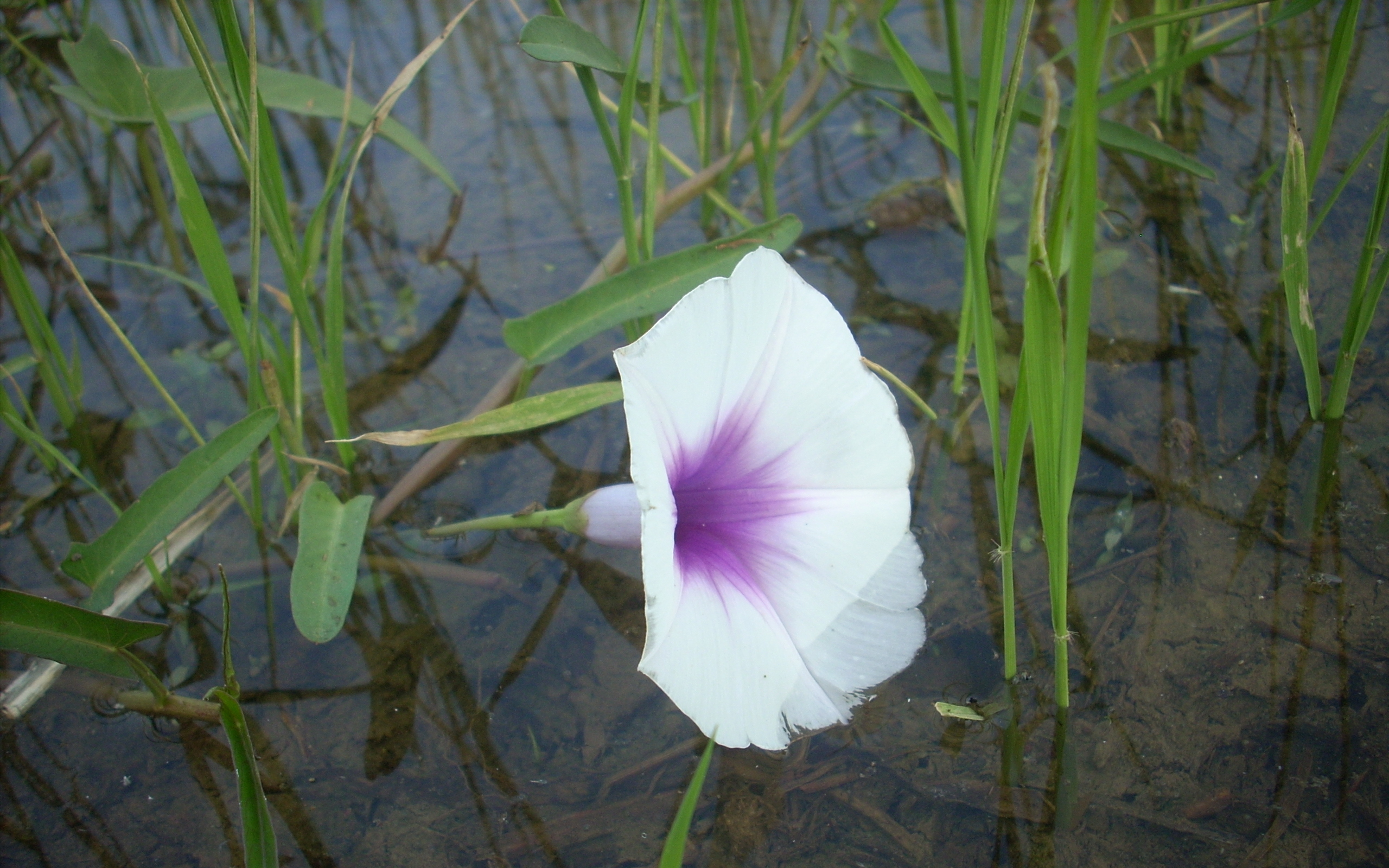 വയല്‍കാഴ്ചകള്‍. അടാട്ട്, ഒമ്പതുമുറി പാടം, തൃശ്ശൂര്‍ This media file is uploaded with Malayalam loves Wikimedia event - 2.